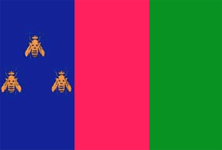 Флаг Бахмачского района